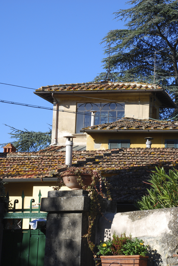 Fondazione Spadolini Nuova Antologia, Via Pian dei Giullari 139, Florence, Italy. Fundation seat: Villa Spadolini at Montici (detail)